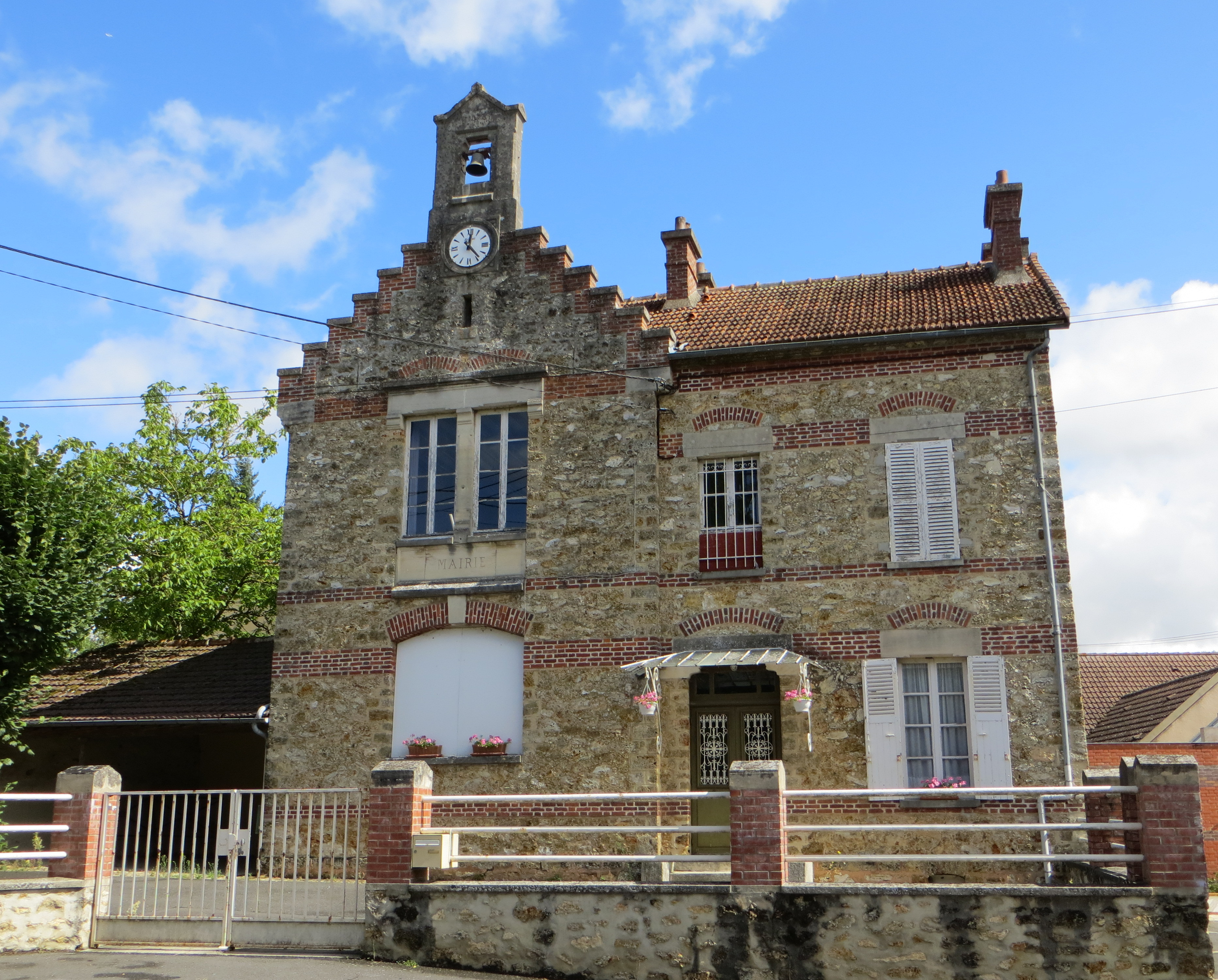 Mairie